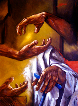 Foto que refleja el vano intento de atrapar la nada que es como atrapar el infinito.